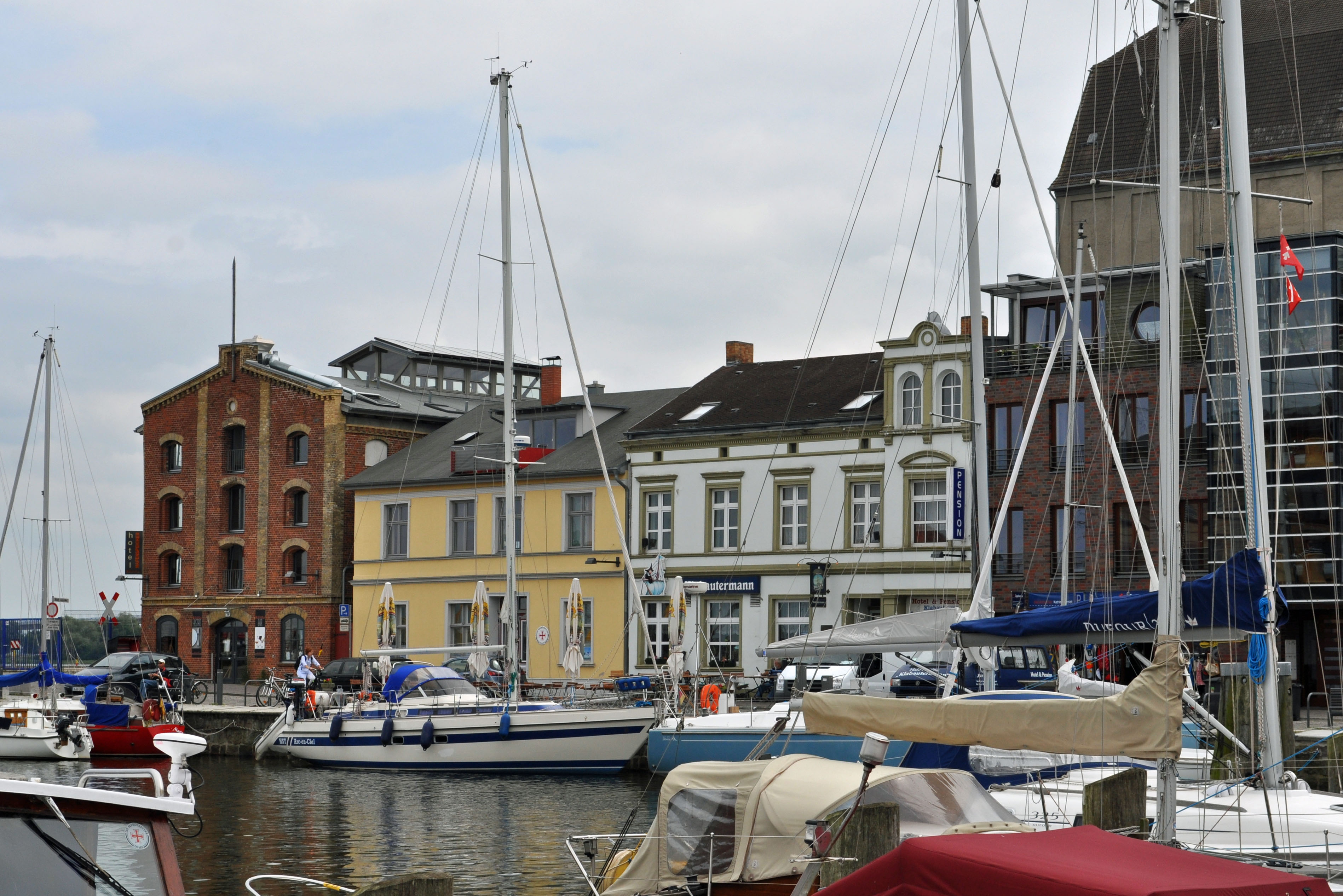 Im Tierpark Stralsund (see Tierpark Stralsund.